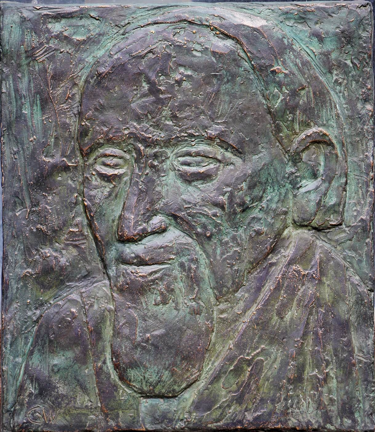 Bronzerelief Lama Anagarika Govinda auf seinem Grabstein auf dem Friedhof in Waldheim (Sachsen)